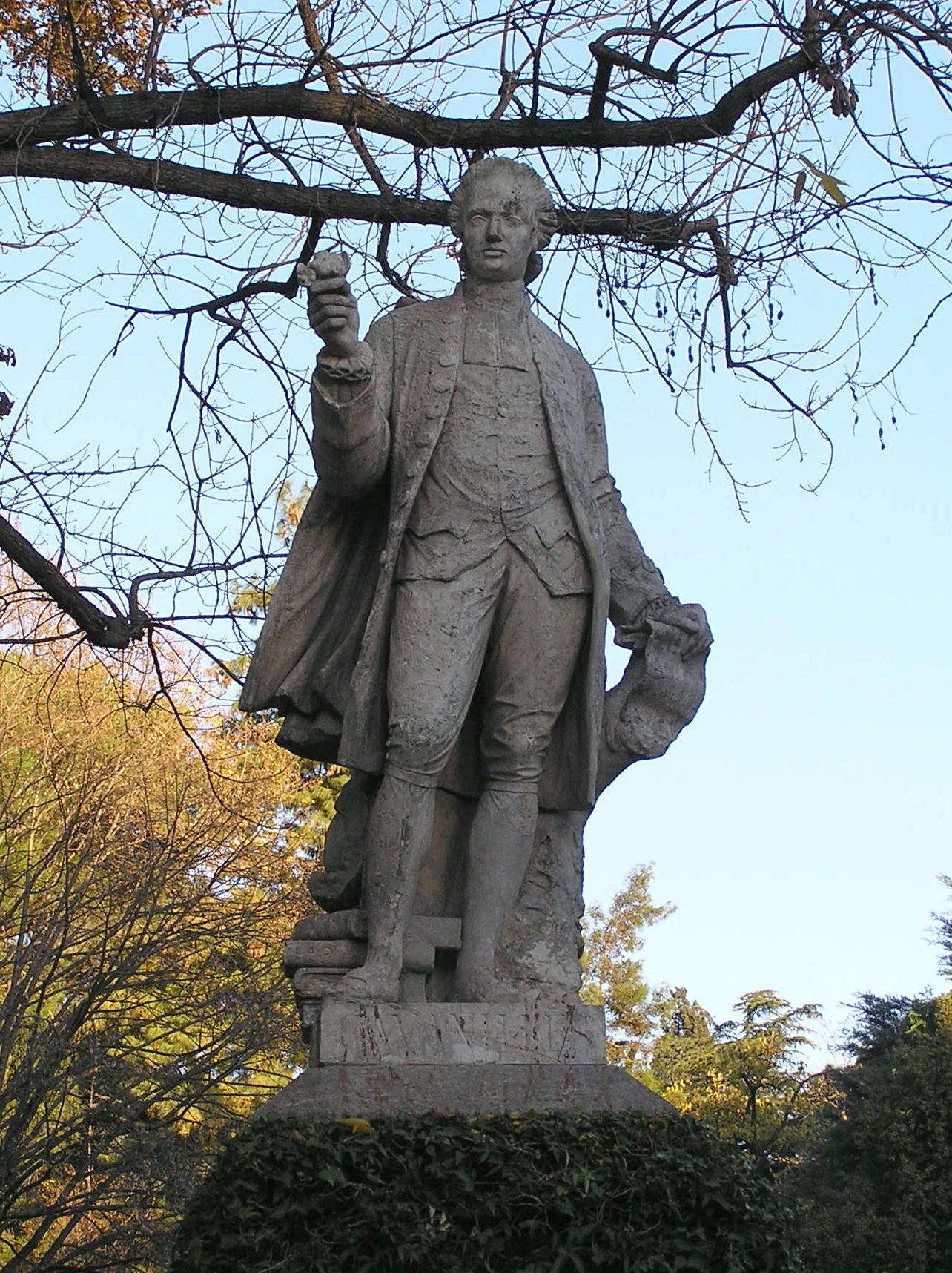 Estatua de Antonio José de Cavanilles en el Real Jardín Botánico de Madrid. Autor de la estatua: José Pagnucci y Zumel